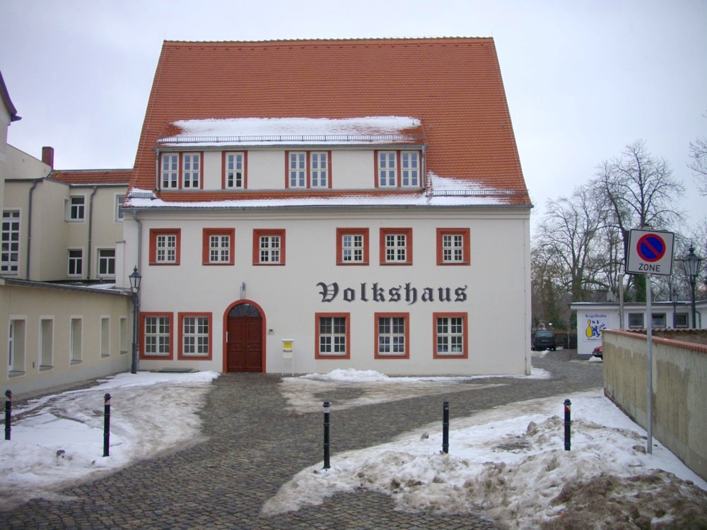 Das Volkshaus in Pegau, Landkreis Leipzig